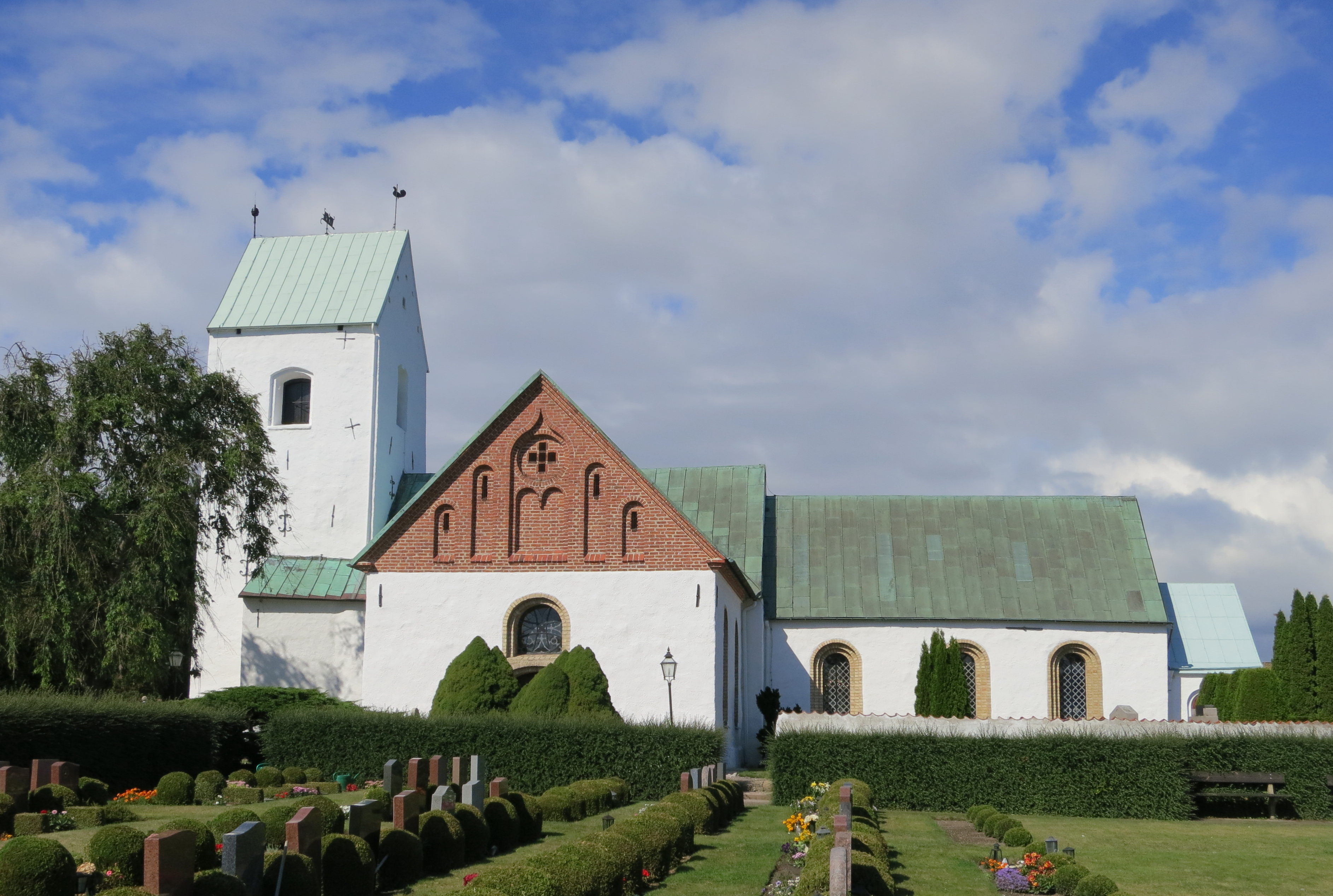 Vellinge kyrka i Vellinge, Skåne